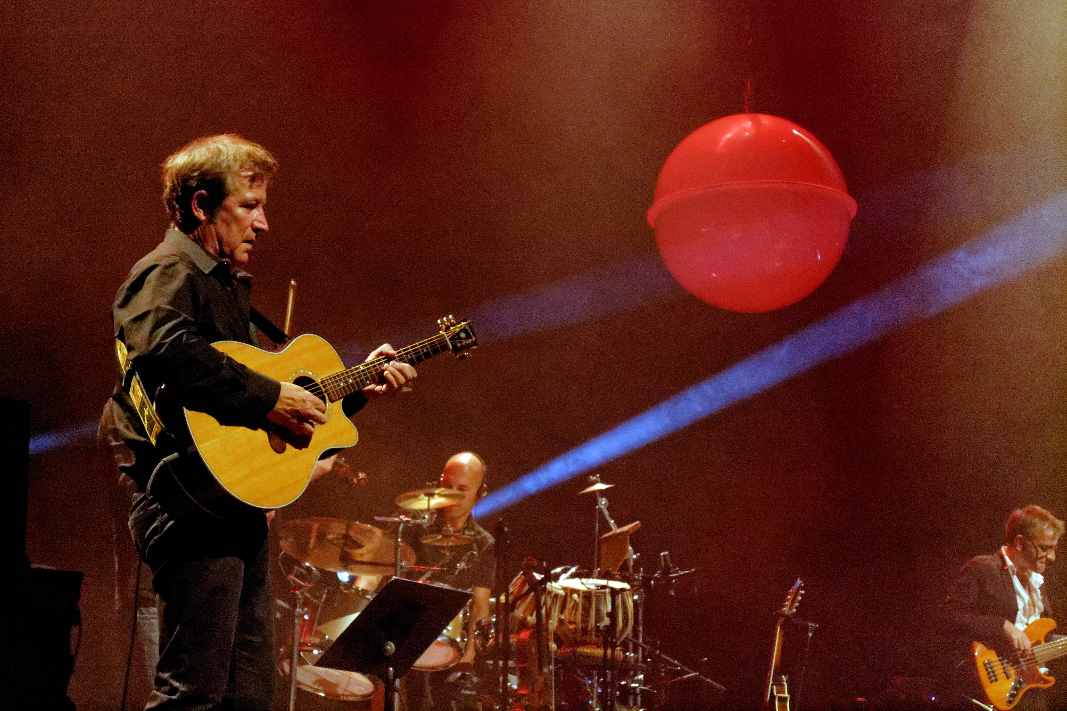 Patrice Marzin avec Gwennyn en concert au théâtre de Cornouaille lors du festival de Cornouaille à Quimper le 25 juillet 2014.